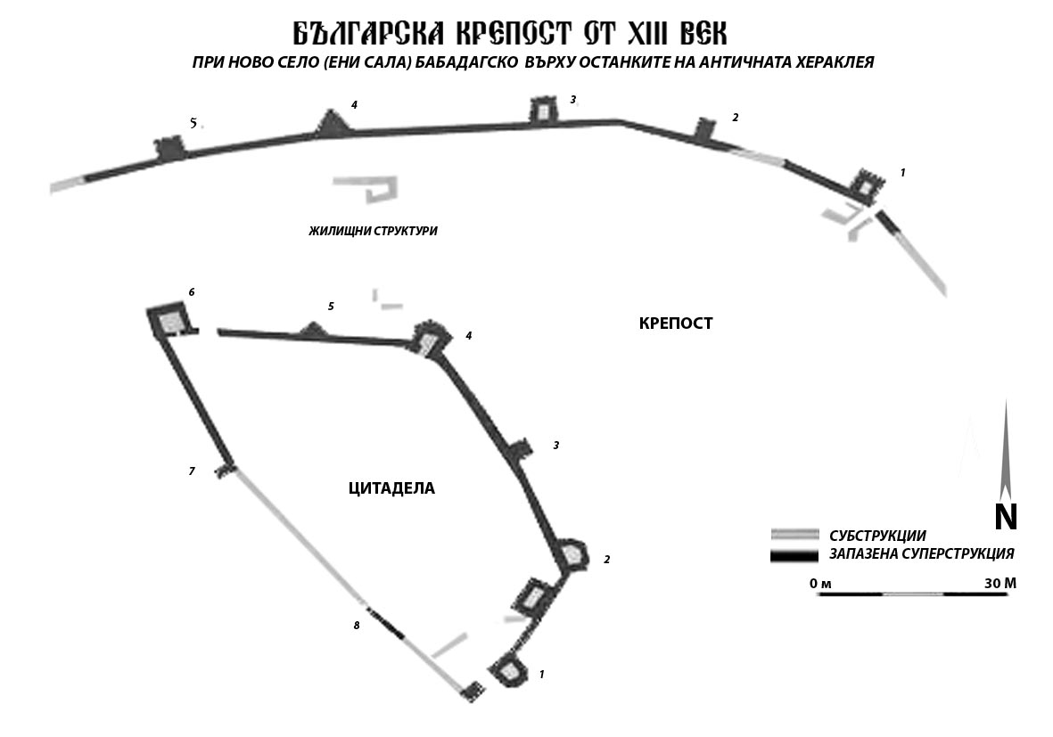 Замъка на българските феодали Енисала, план арх. Миломир Богданов 01